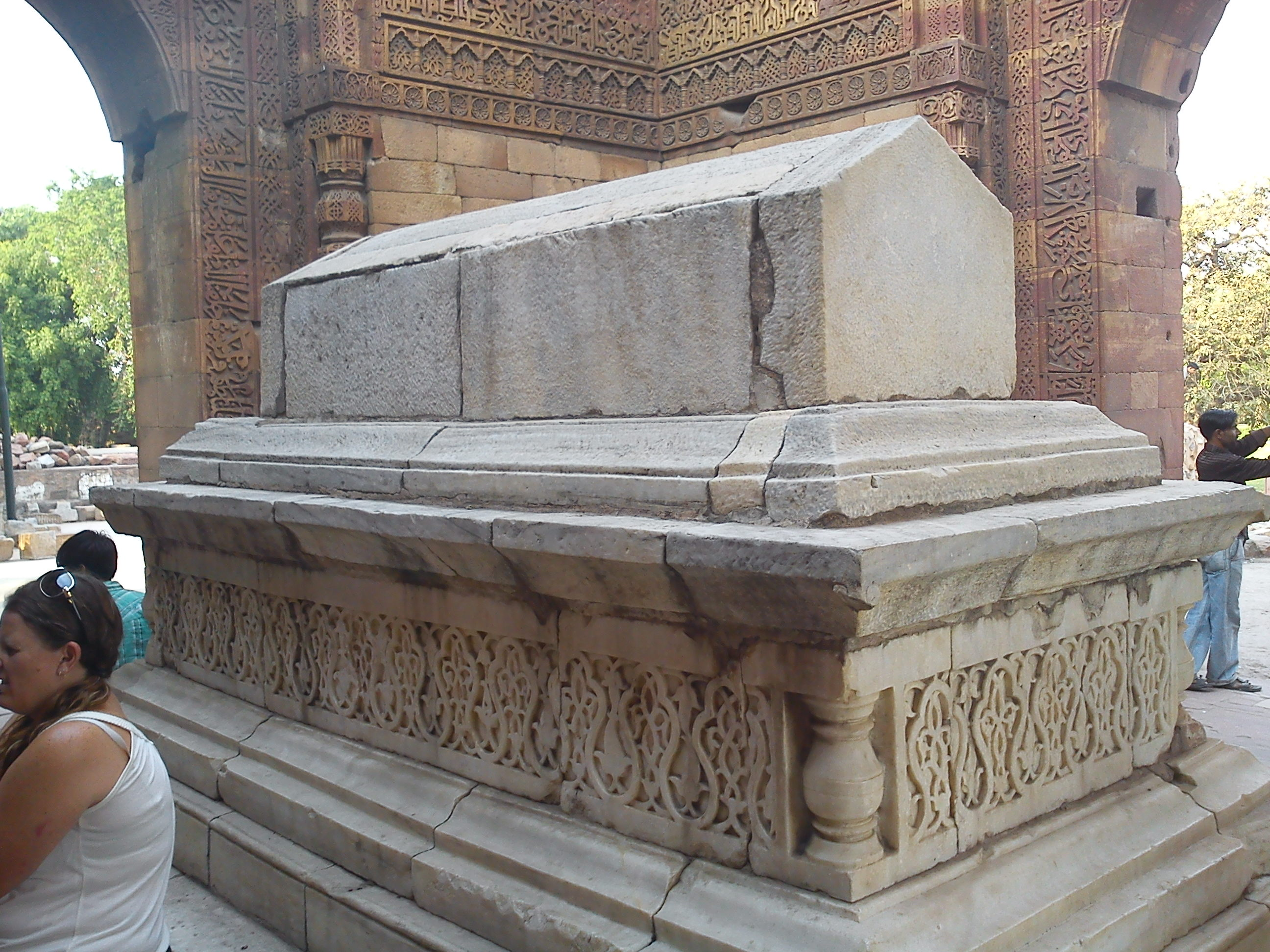 ഇൽതുമിഷിന്റെ കല്ലറ